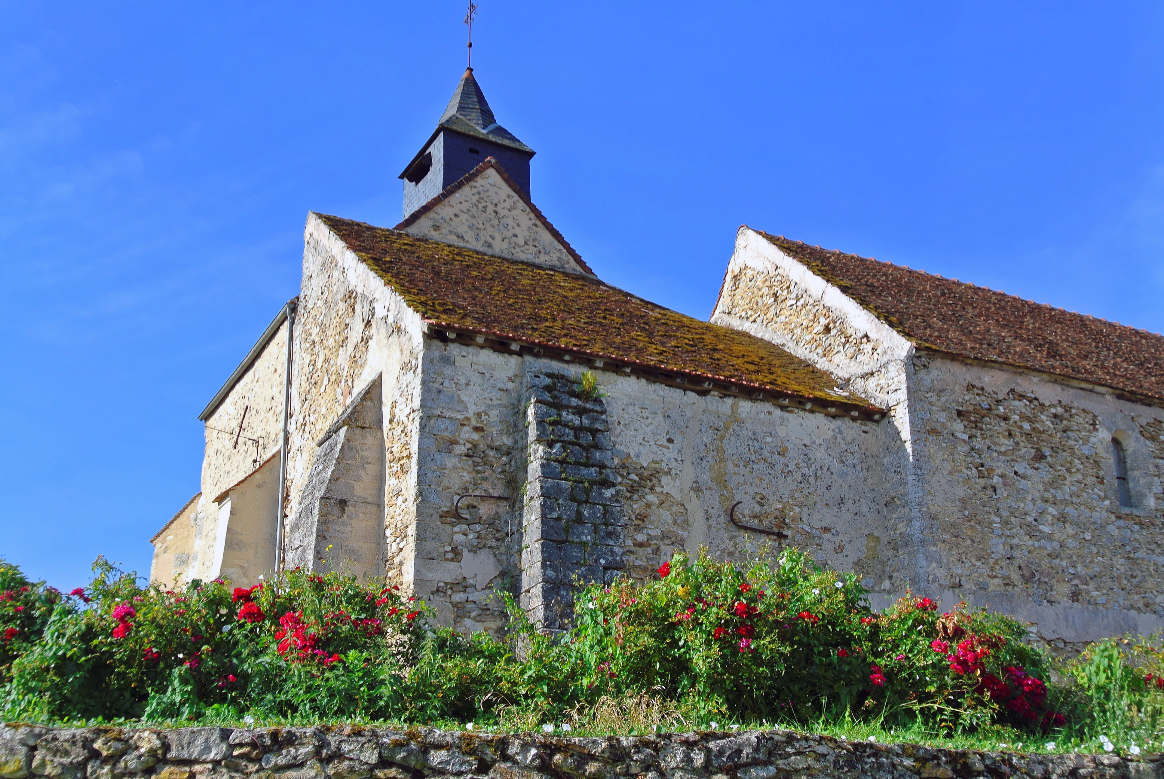 Église Saint-Éloi de Montigny-lès-Condé (02).